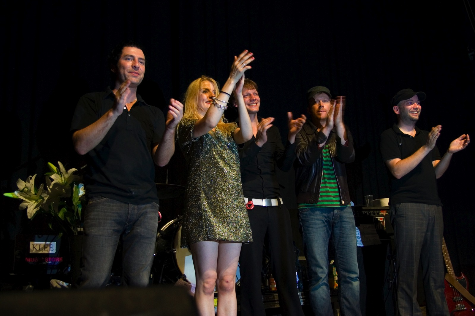 Klee in der zeche Carl, Essen